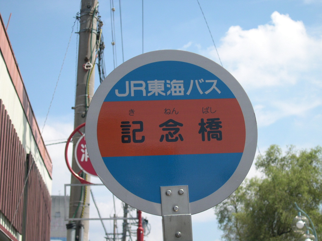 2006-9-2撮影